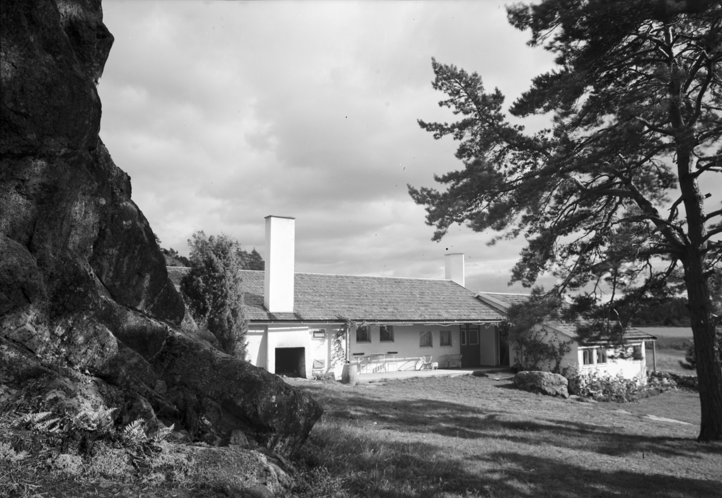 Sommarhuset Stennäs, arkitekt Gunnar Asplund